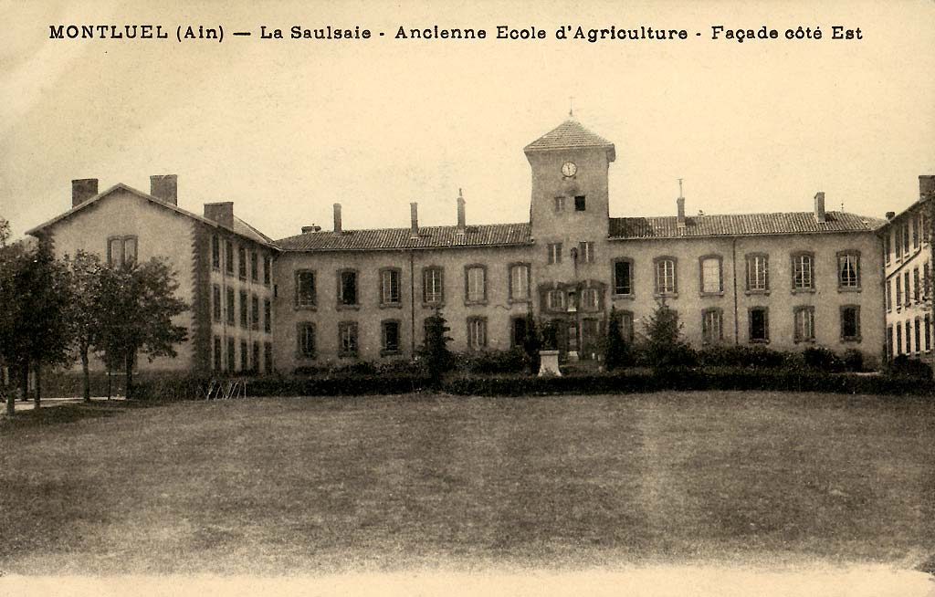 Ancien institut agricole de La Saulsaie